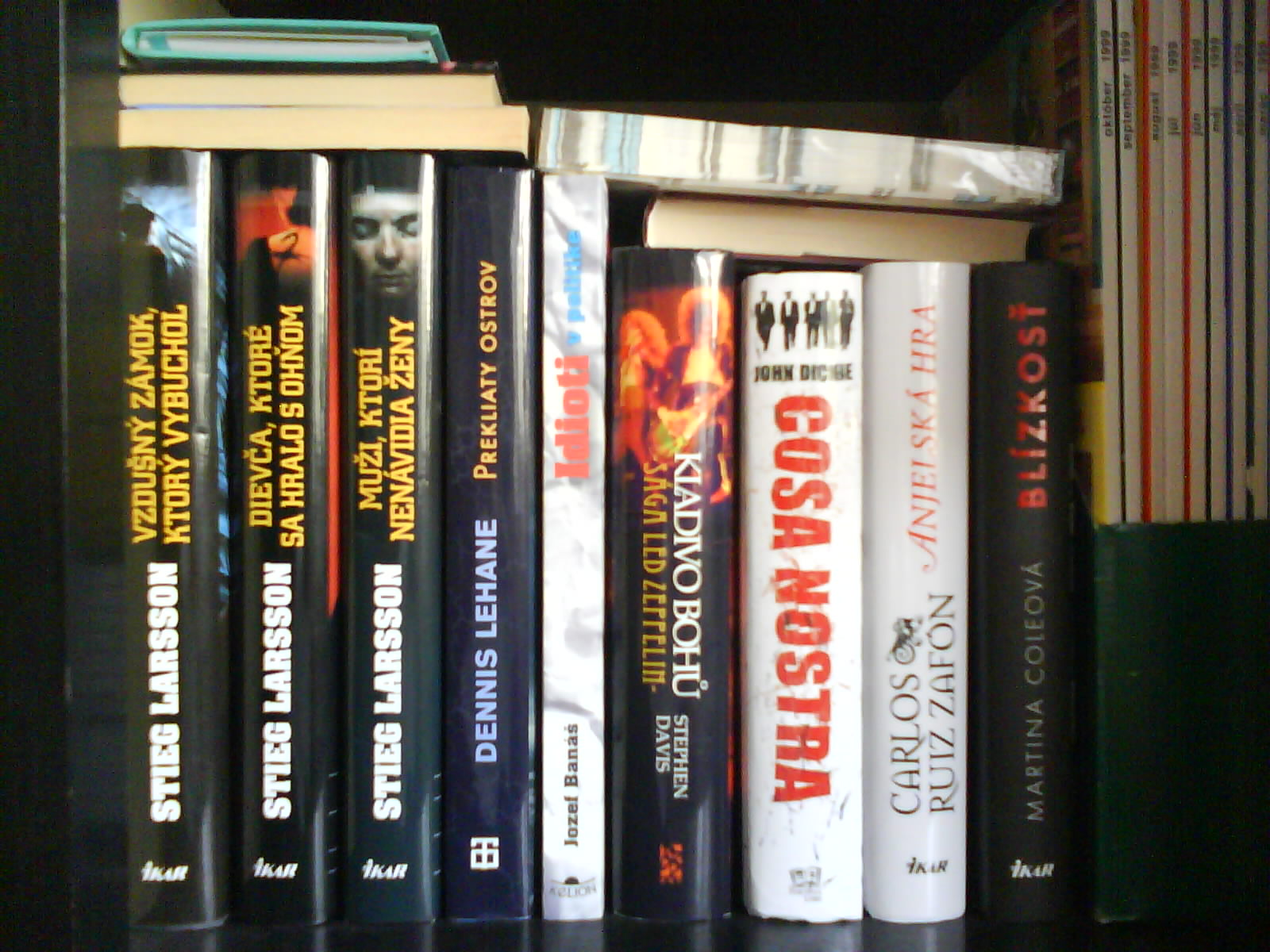 Pár kníh